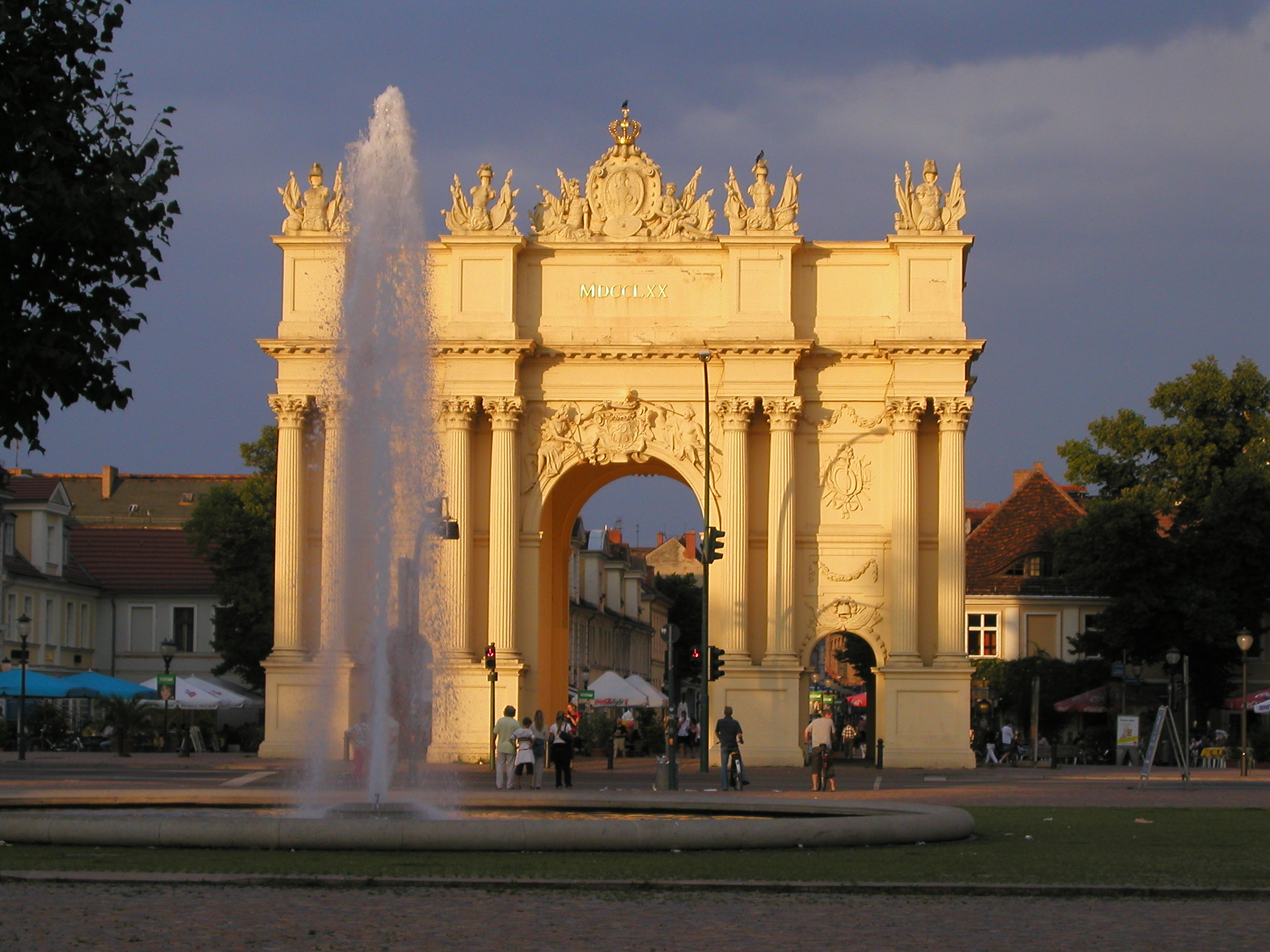 Potsdam Brandenburger Gate